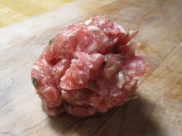 Homemade garlic sage breakfast sausage